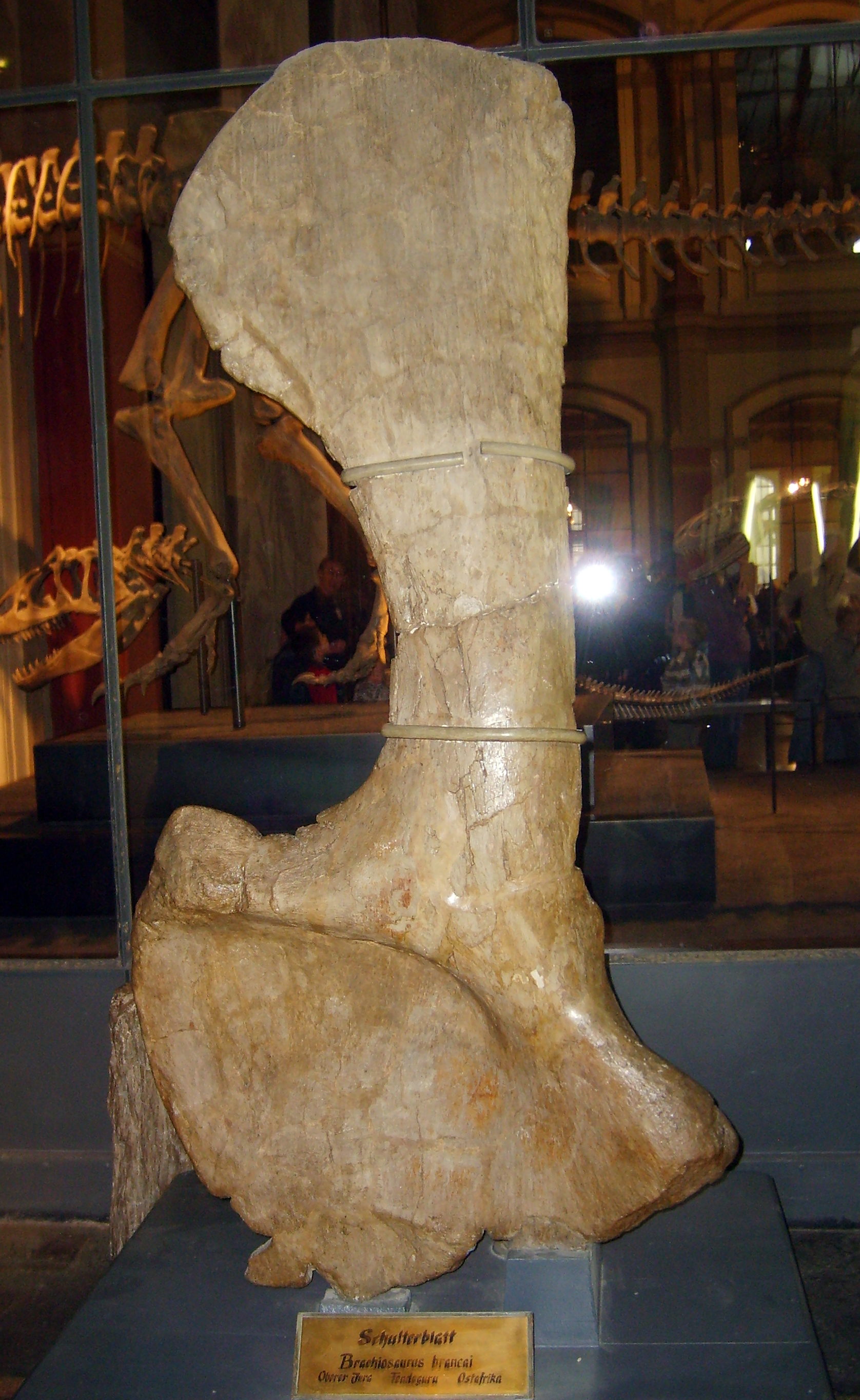 Giraffatitan scapula HMN Sa9 at the Museum für Naturkunde, Berlin.